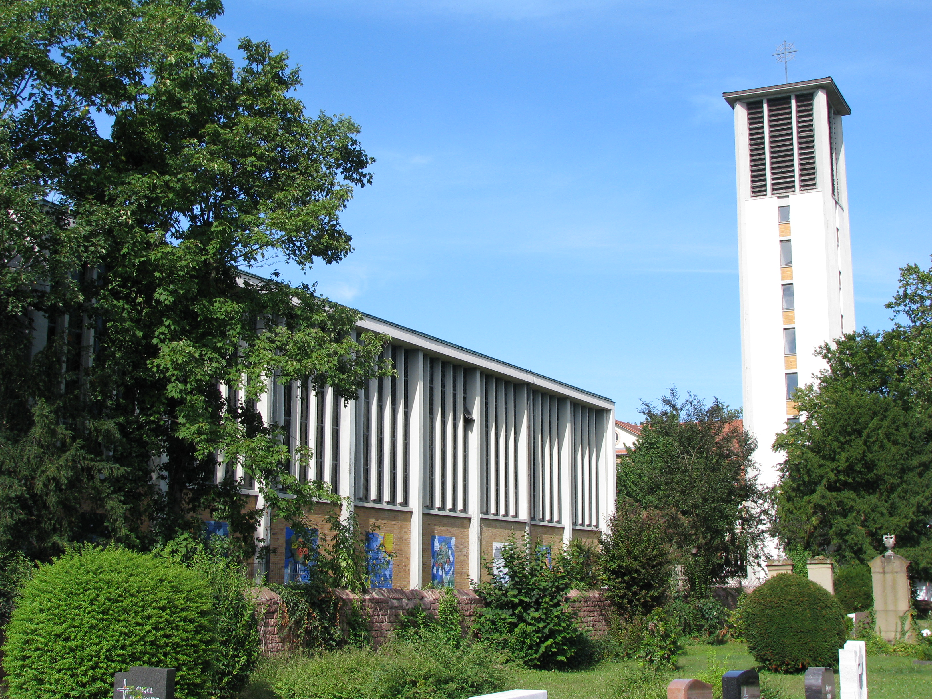 Pfarrkirche St. Bartholomäus, Heidelberg-Wieblingen. Erbaut 1955-56, Architekt: Manfred Schmitt-Fiebig